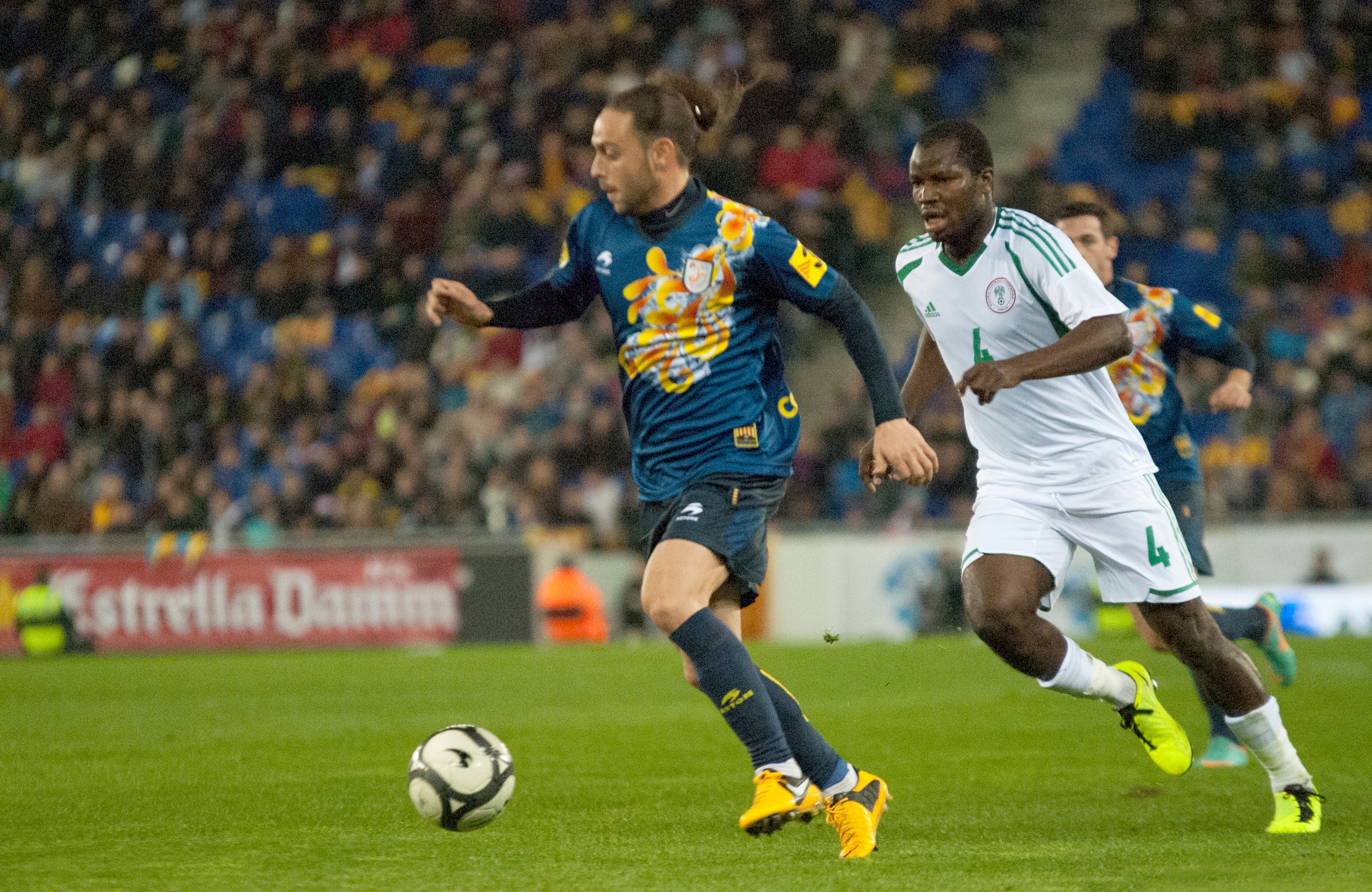 Sergio García de la Fuente, en un partit internacional amb la samarreta catalana.